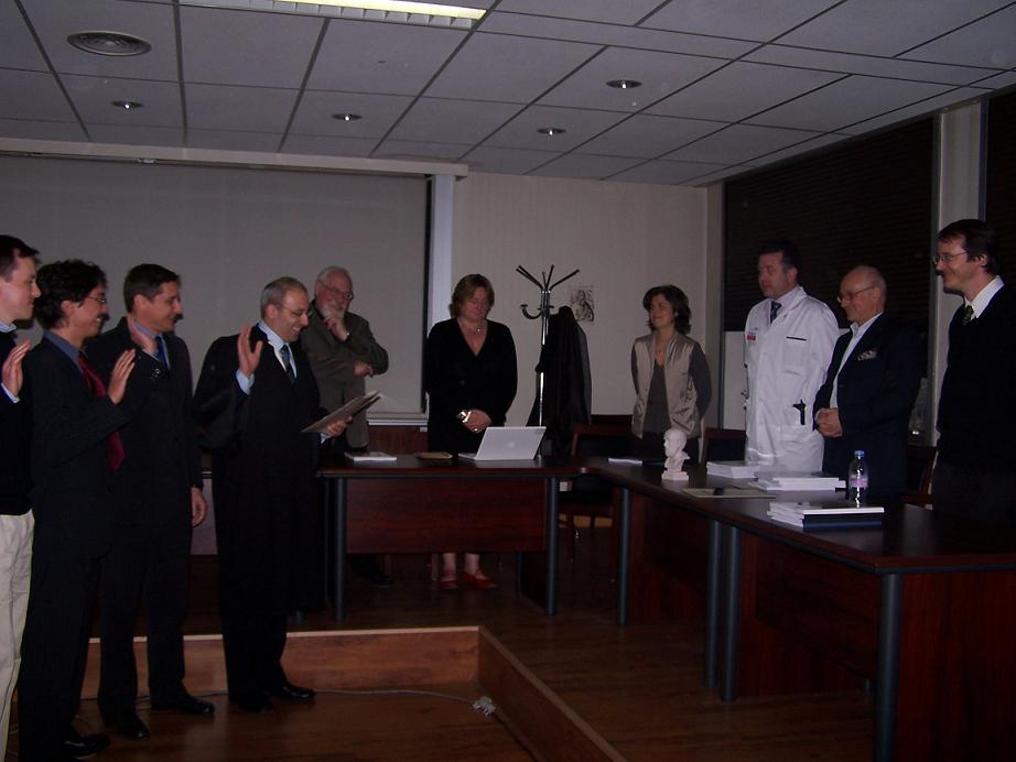 Soutenance de thèses de doctorat en médecine à l'université Bichat en 2008 : toge pour l'ainé des soutenants qui prêtent serment devant les membres du jury et un buste d'Hippocrate